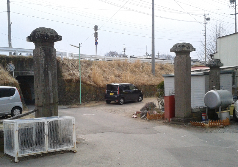 岩村田遊郭跡に残る門柱